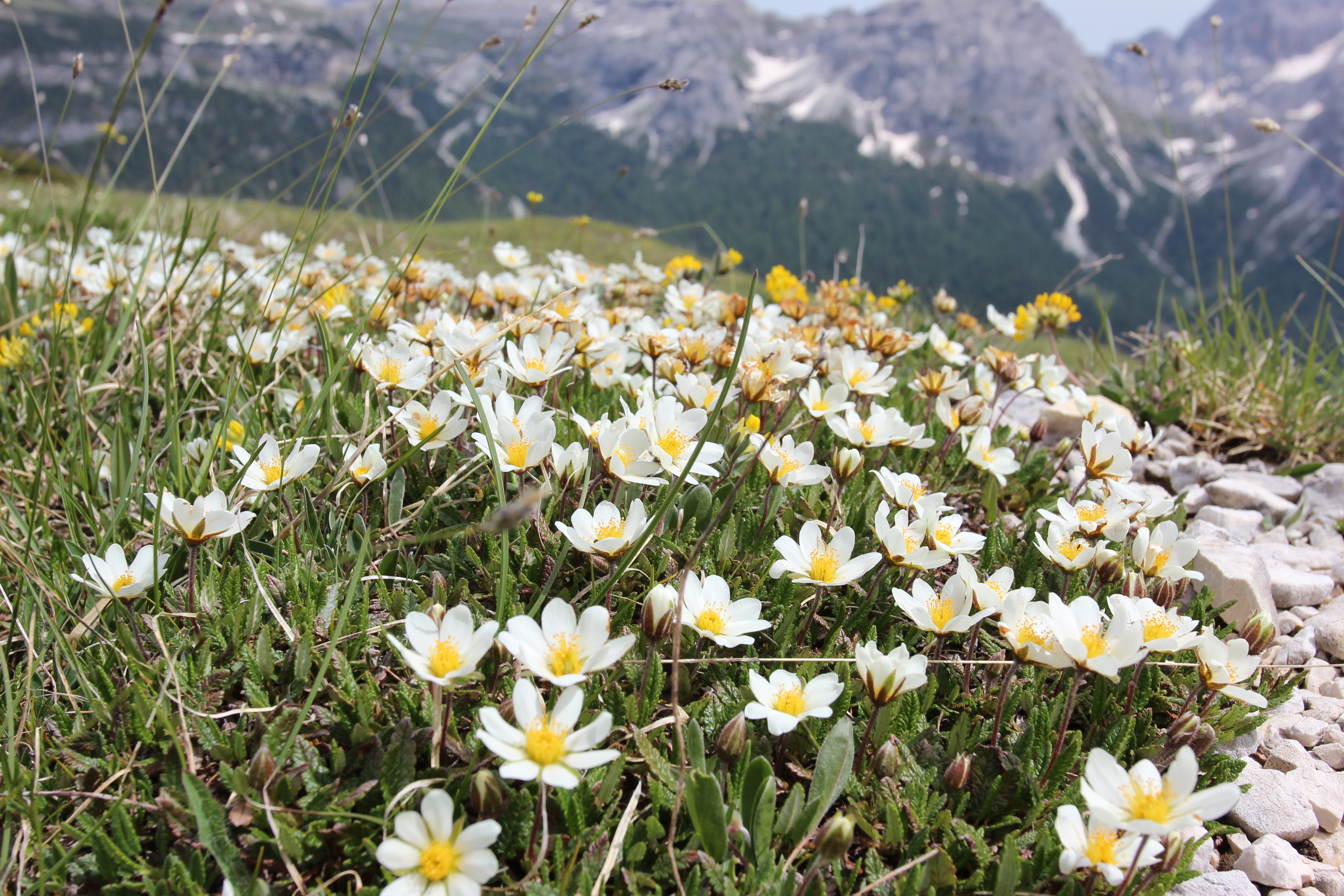 Weiße Silberwurz (Dryas octopetala)